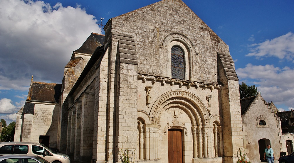 église St Pierre